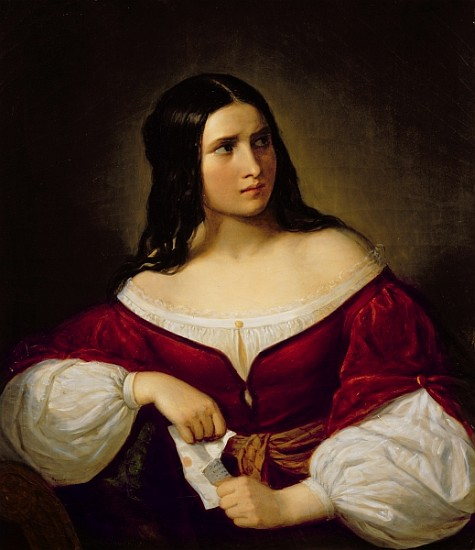 Jealousy